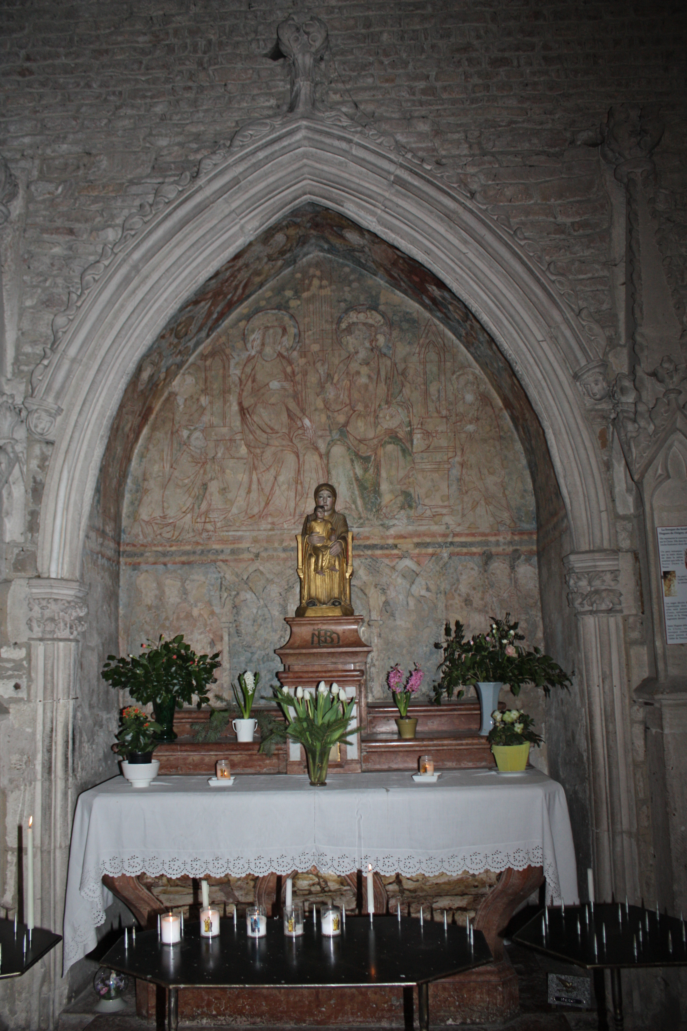 Chapelle de Notre Dame la Brune